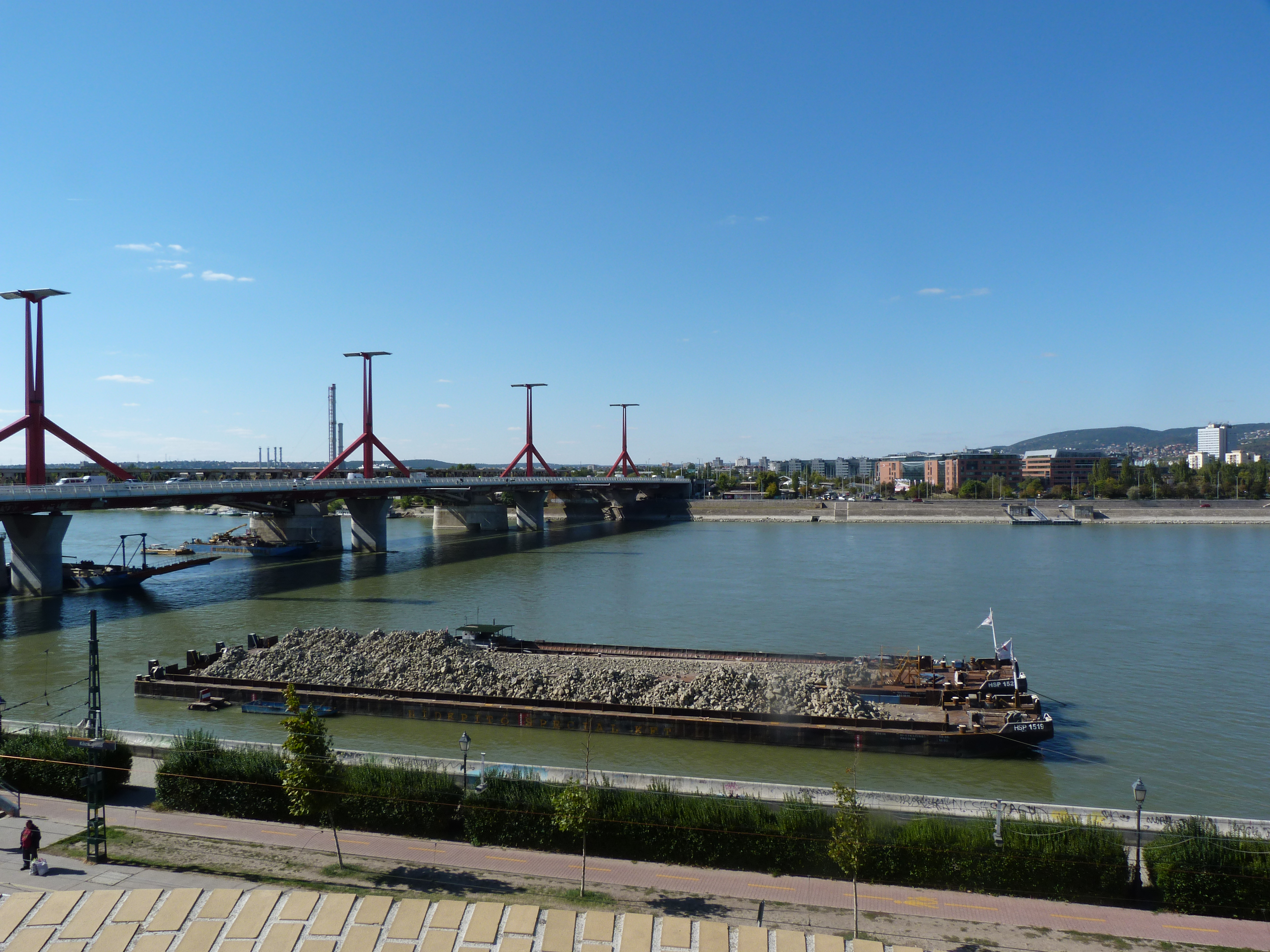 Budapest, Rákóczi híd (A pesti oldalról). Uszály a Rákóczi hídnál.